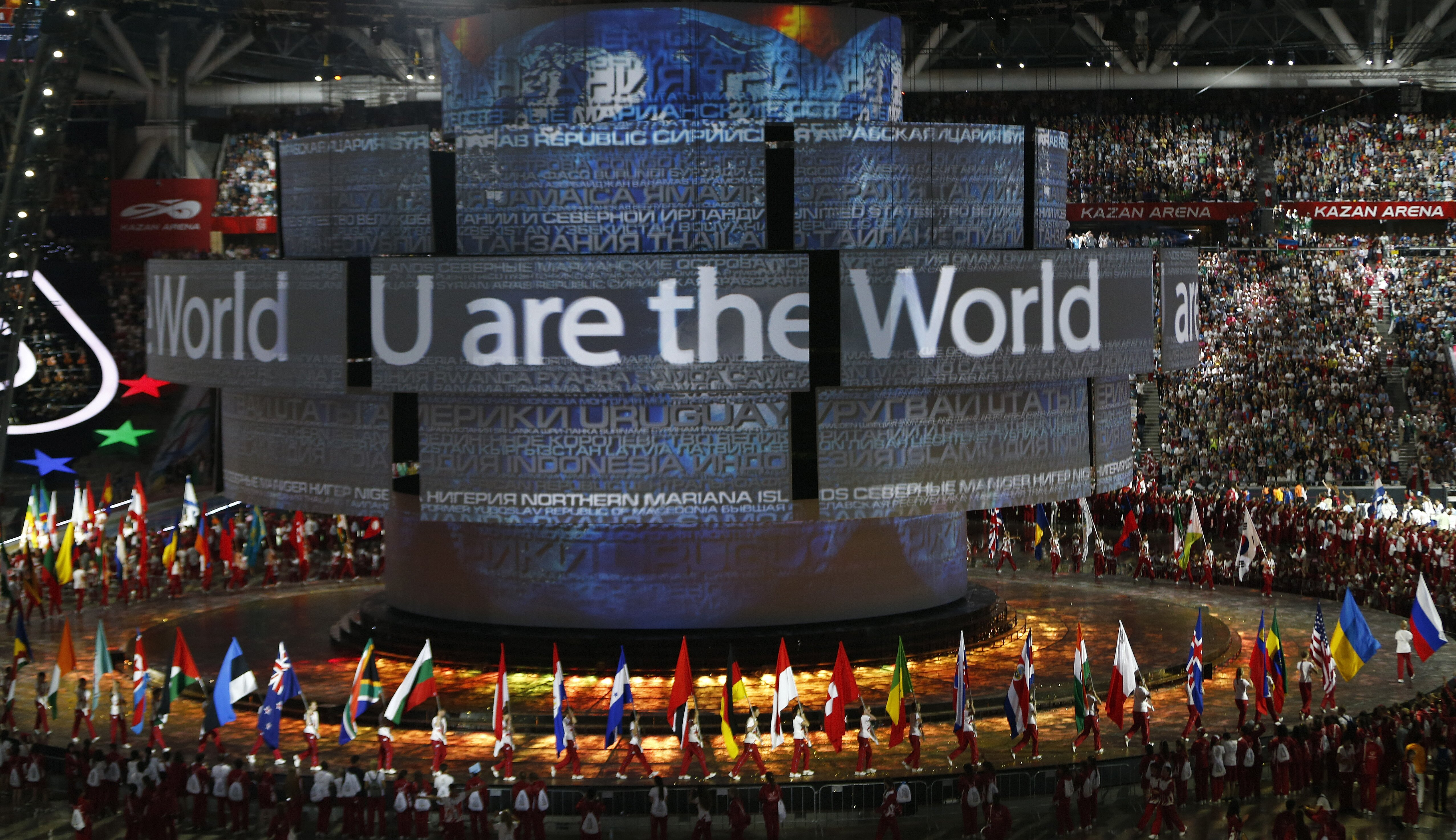 Стадион Казань Арена, Открытие Универсиады-2013